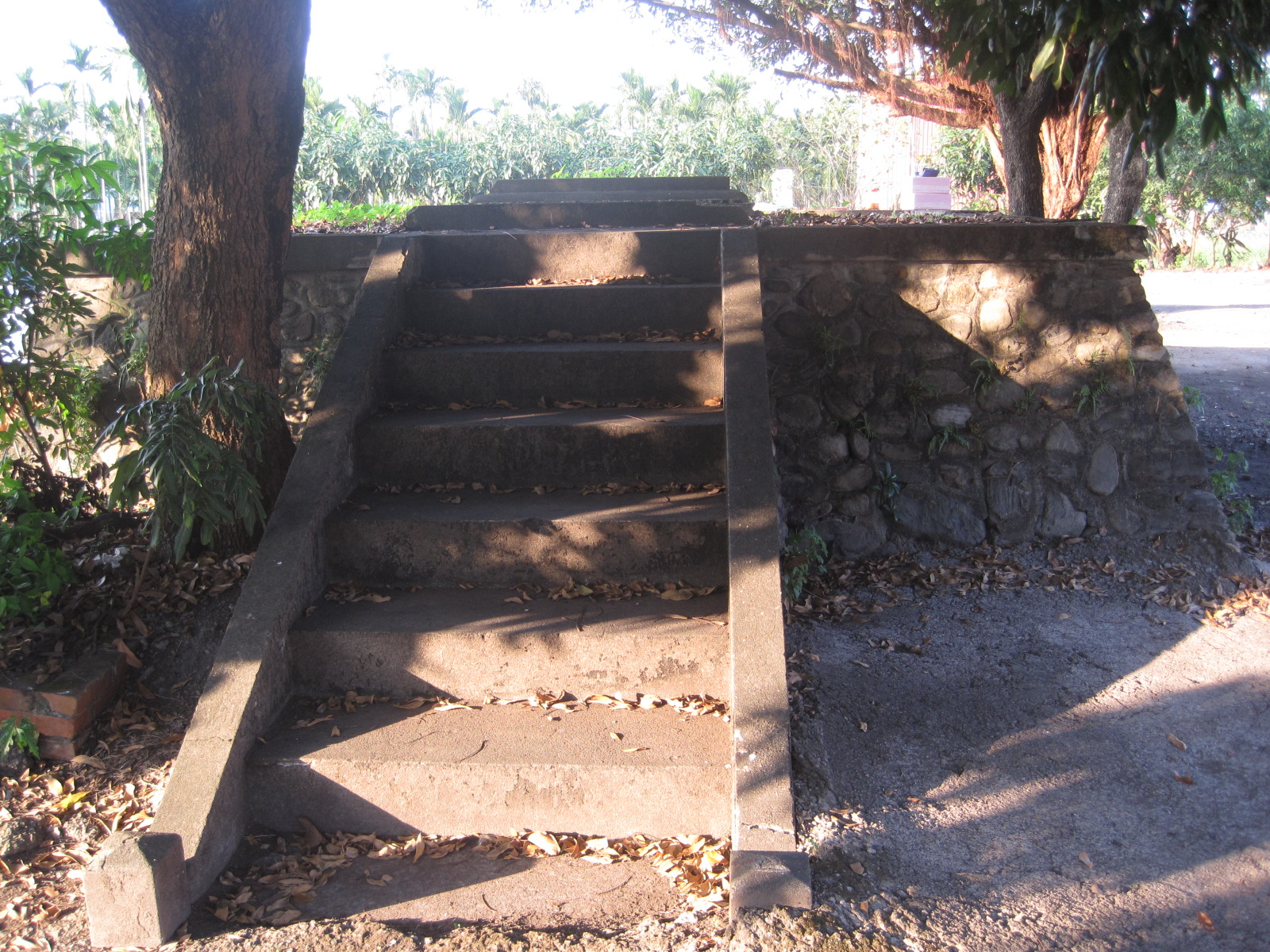 林邊庄溪州社遺跡，位於南州糖廠附近